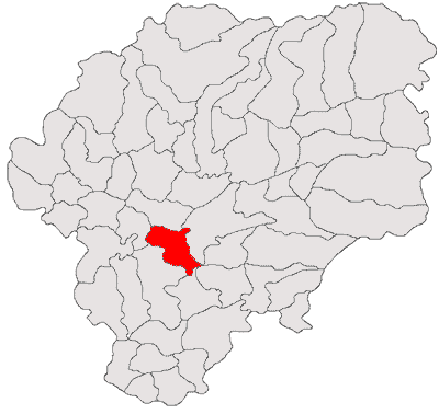 Categorie:Hărţi ale judeţului Bistriţa-Năsăud